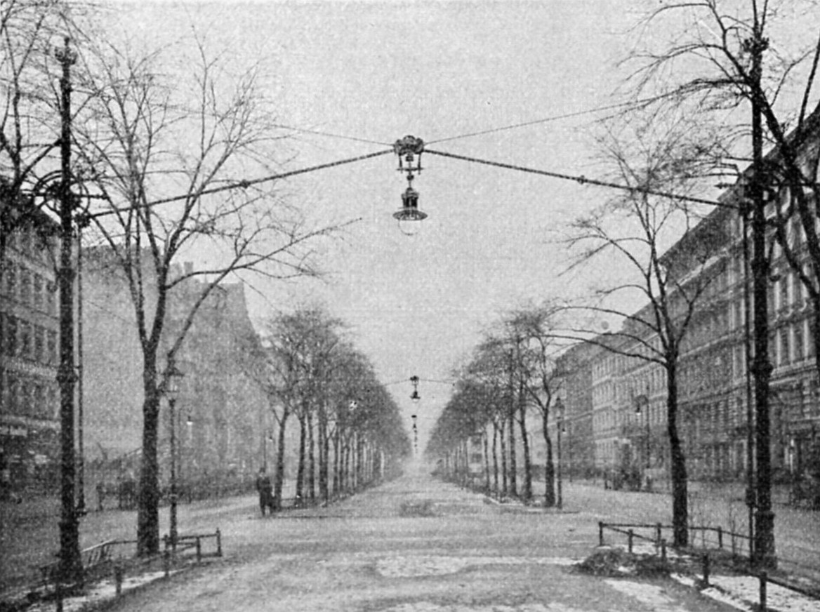 Greifswalder Straße in Berlin mit neuer Beleuchtung der Mittelpromenade (2000kerzige Graetzin-Preßgas-Leuchten mit Herablaßvorrichtungen).